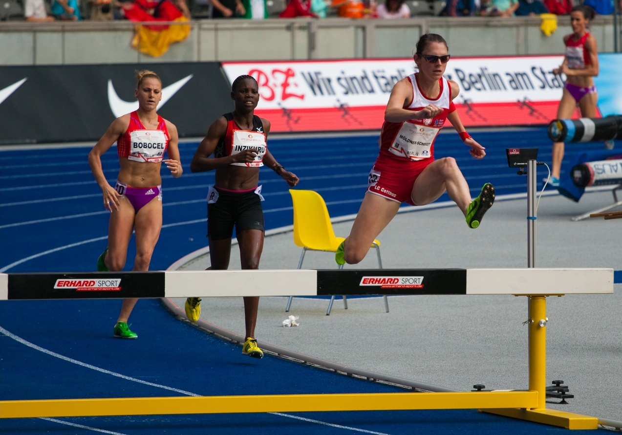 ISTAF Berlin 2012, 3000m Hindernislauf: Ancuta Bobocel, Docus Inzikuru, Antje Möldner-Schmidt